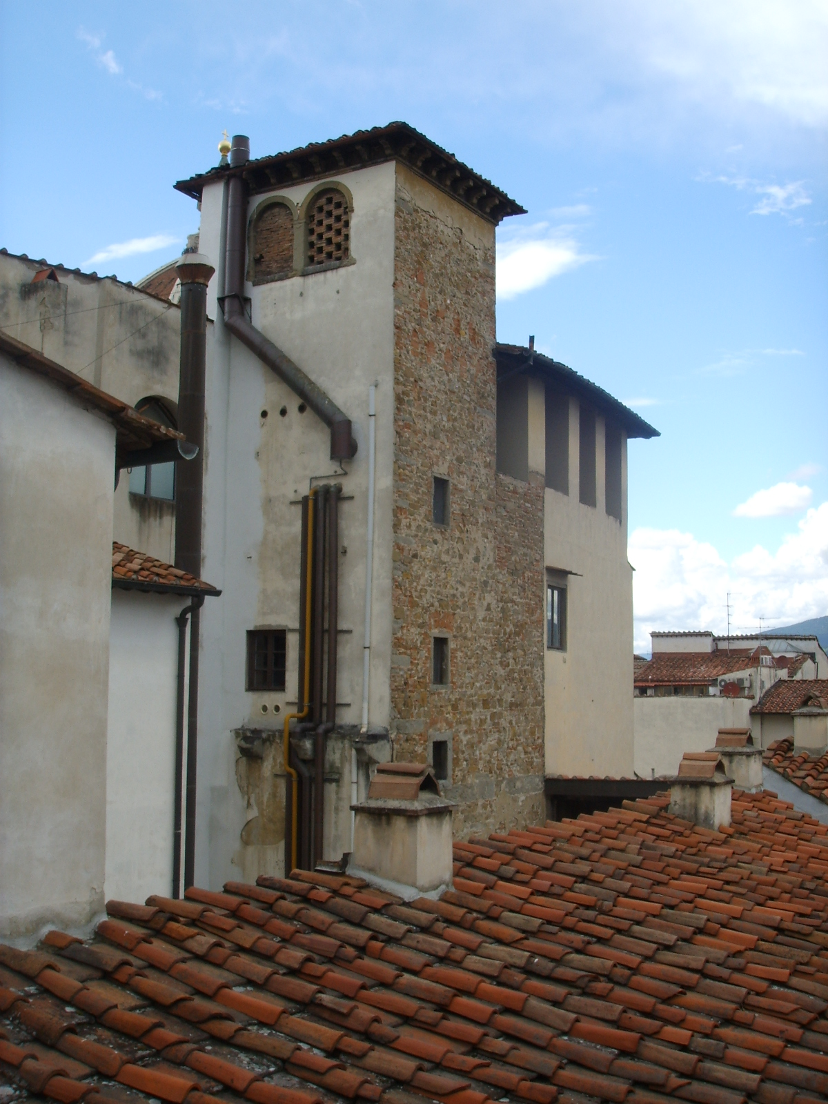 Palazzo ramirez de Montalto, torretta